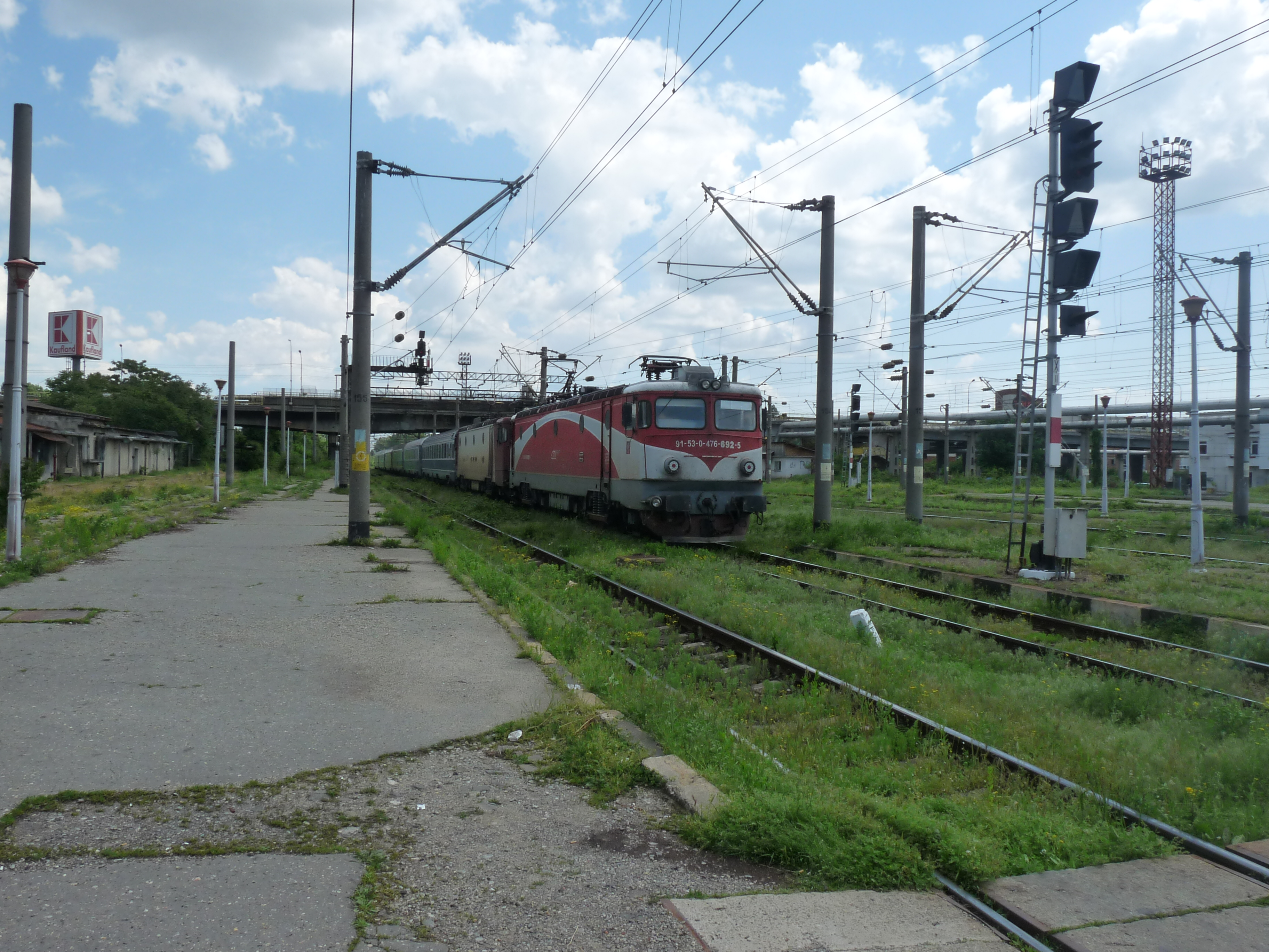 Ploiești station